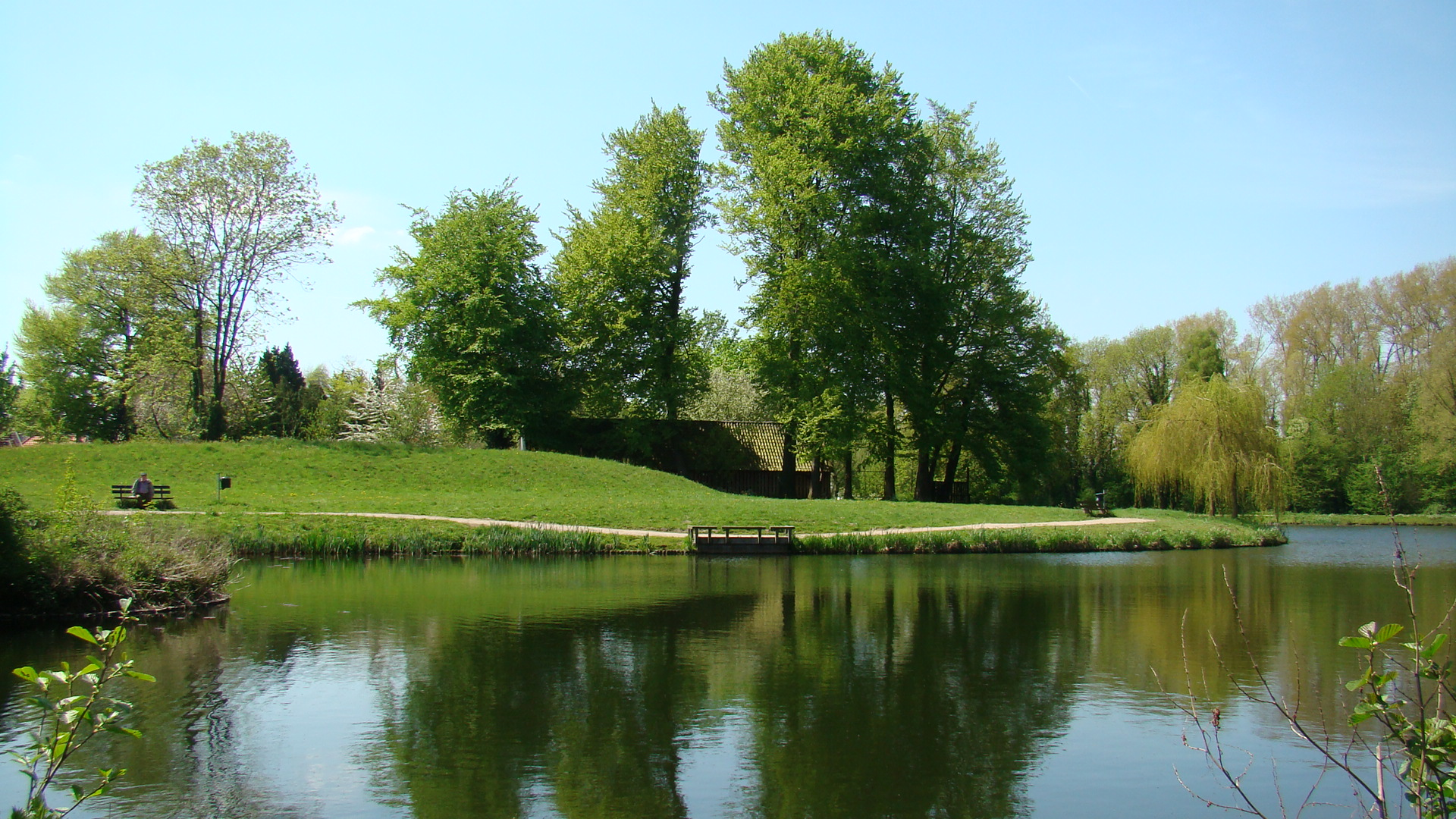 Grote Gracht, bredevoort met restant bastion "Treurniet" voormalige kruittoren.